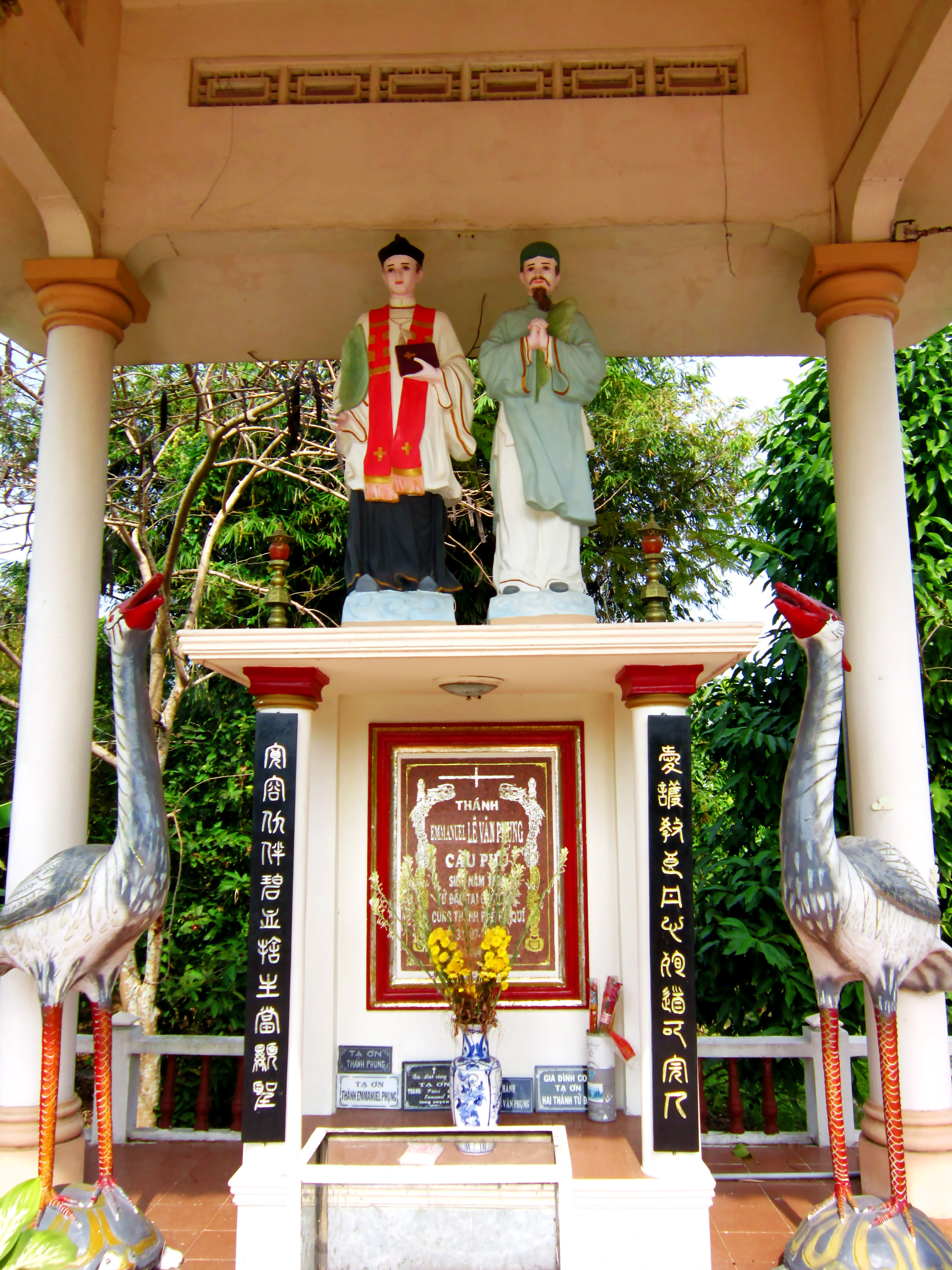 Đền tưởng niệm hai vị Thánh tử đạo là Phêrô Đoàn Công Quí và Emmanuel Lê Văn Phụng trên Cù lao Giêng, thuộc huyện Chợ Mới, An Giang, Việt Nam.